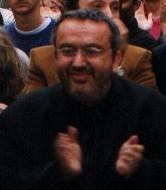 Dominique Farrugia photographié en juin 1999 devant les locaux de la chaine Comédie lors de la dernière de "La Grosse Emission". Photo sous GFDL prise par Utilisateur:Jgremillot